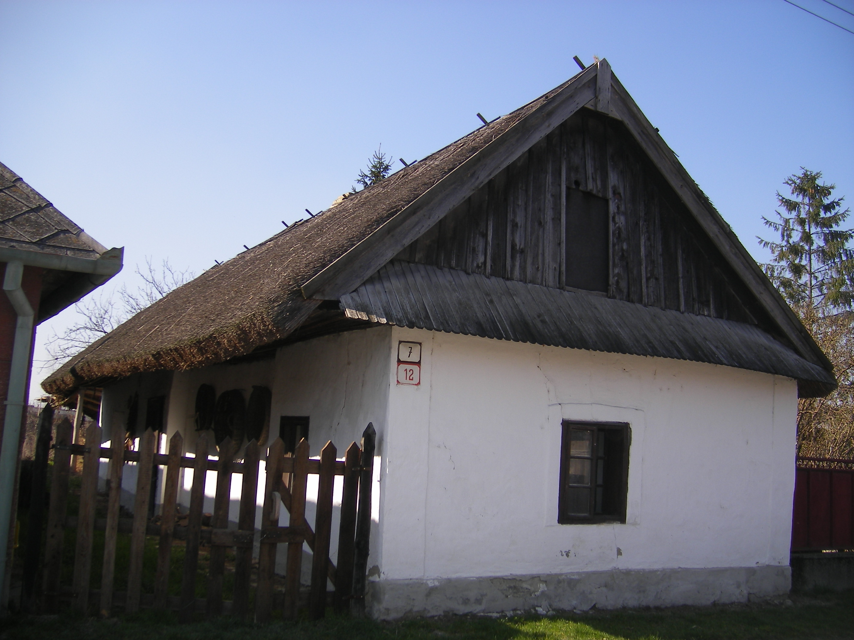 Csicsó - az 1965-ös árvíz után mutatóba megmaradt régi házak egyike